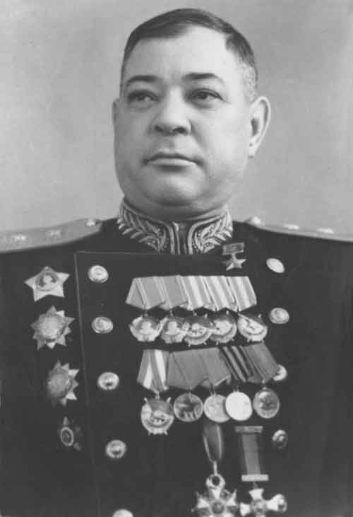 Герой Советского Союза Виктор Кириллович Баранов